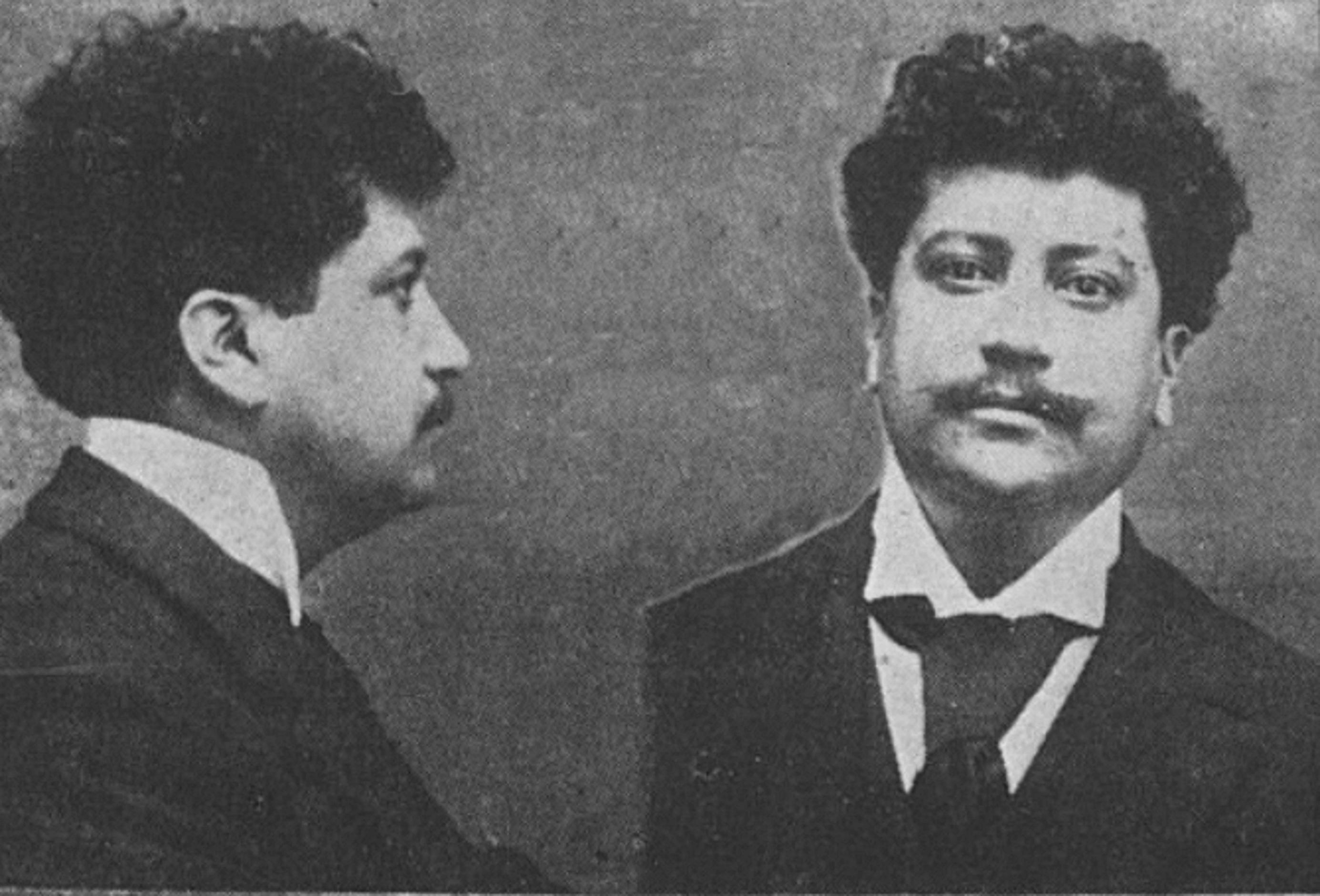 Ricardo Flores Magón periodista y anarquista mexicano preso en 1906.